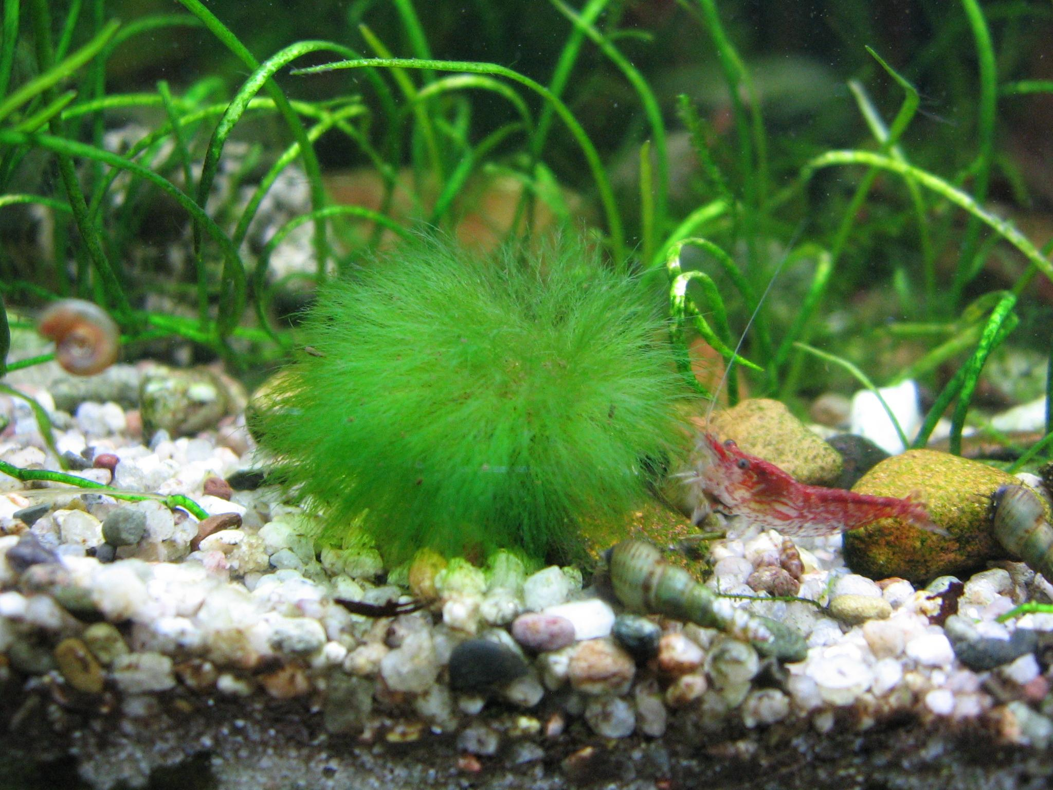 Unbekannte Alge